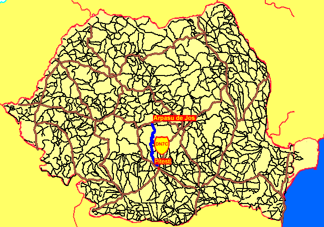 DN7C road in Romania